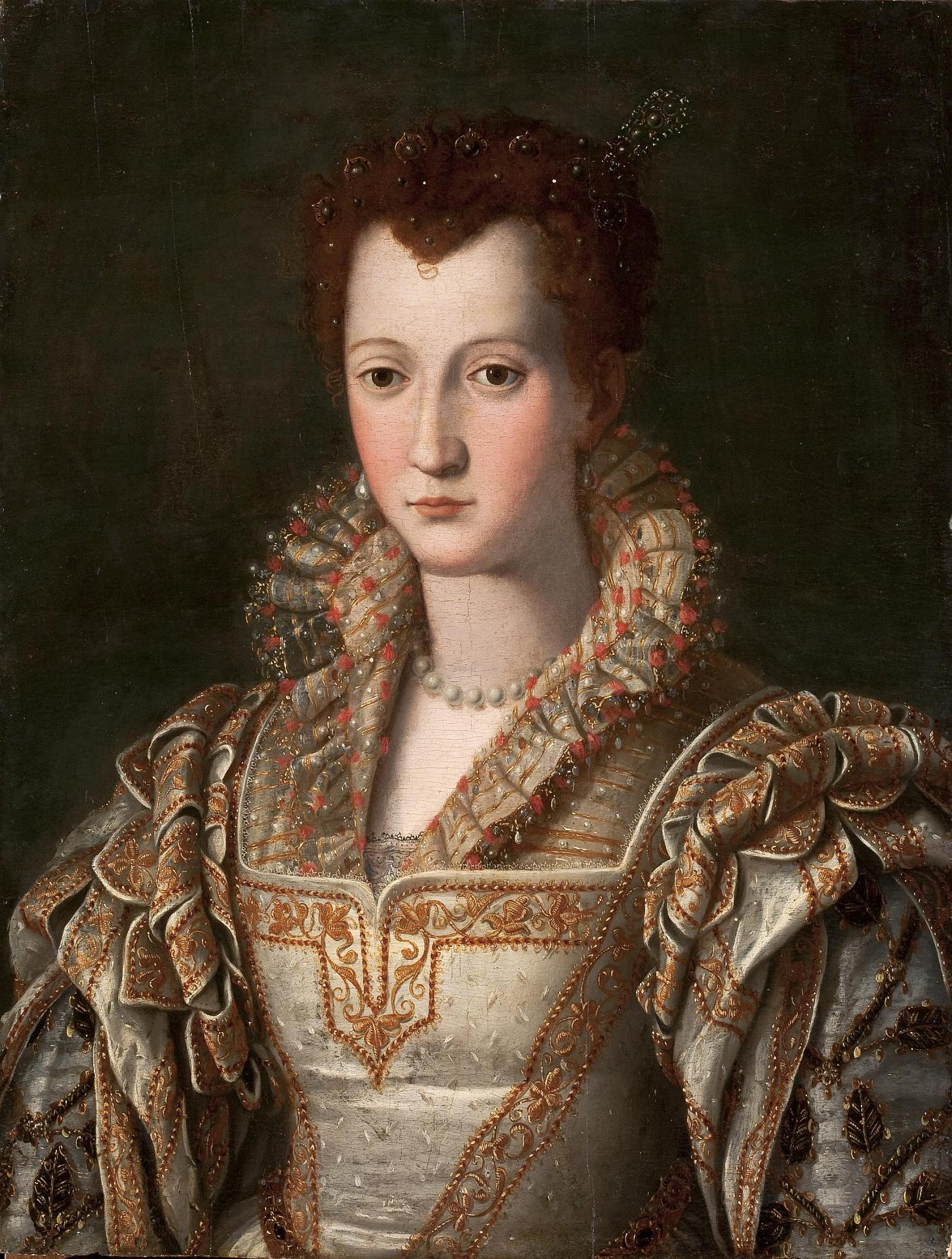 Ritratto di Leonora Álvarez de Toledo (1553-1576) detta Dianora, Ambito di Alessandro Allori, Hermitage, San Pietroburgo